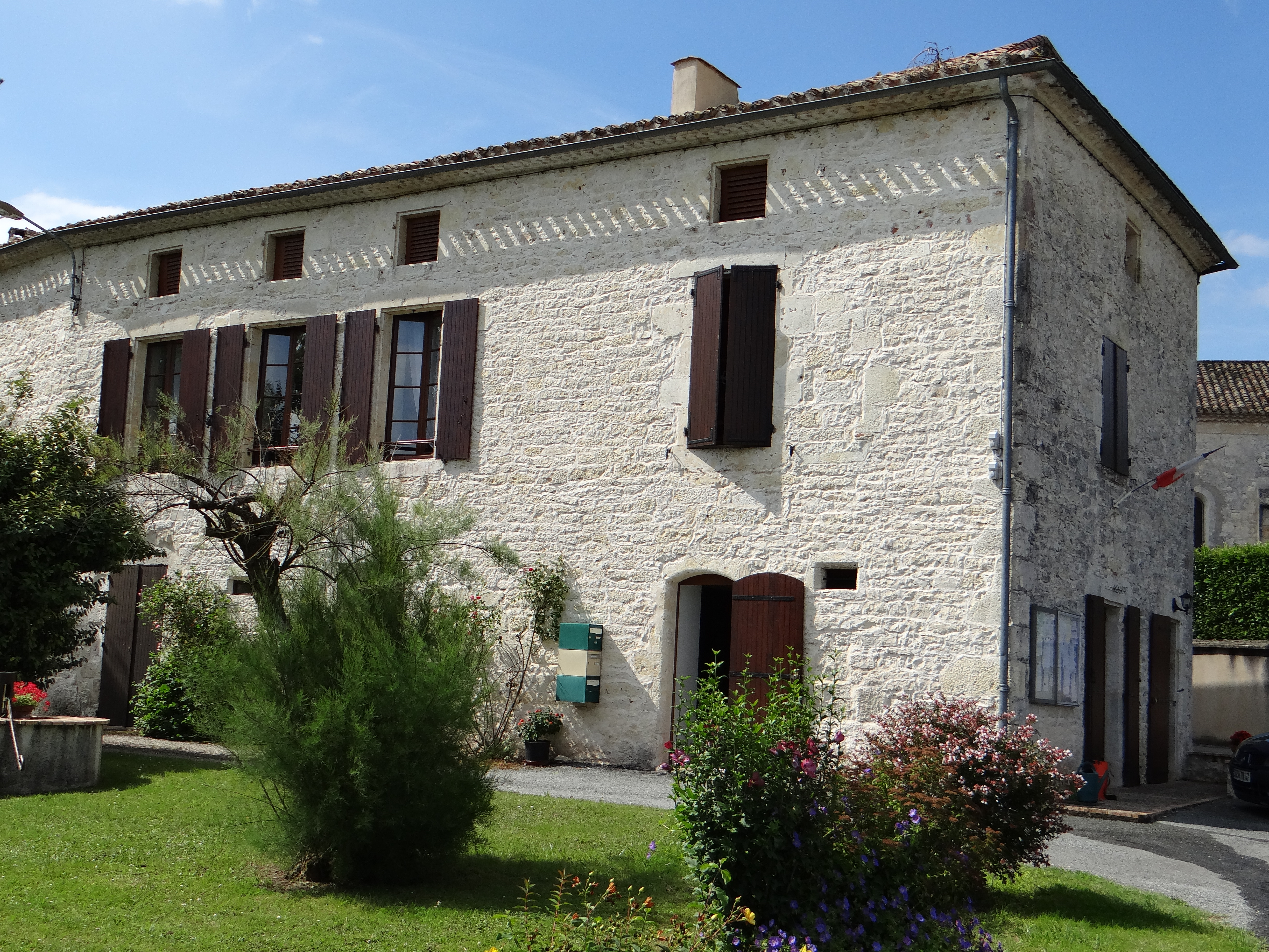 Bournel - Mairie